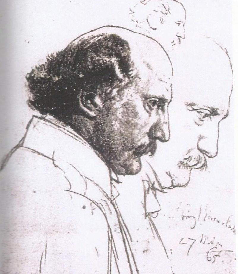 Каликст Густав Бирон (1817—1882)